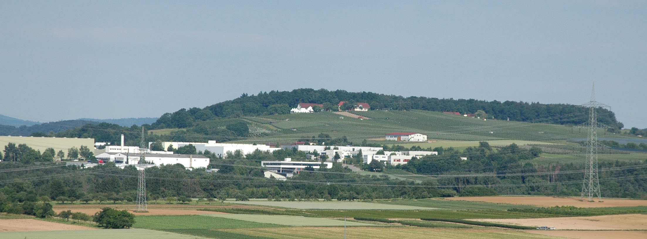 Blick auf den Haigern von Nordheim.